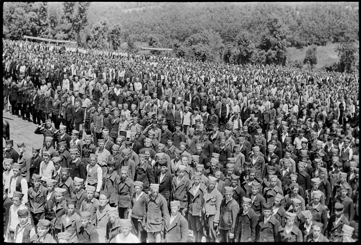 Други равногорски корпус прославља војничку славу Видовдан, 28. јуна 1944. године, у селу Лазац, на планини Јелици